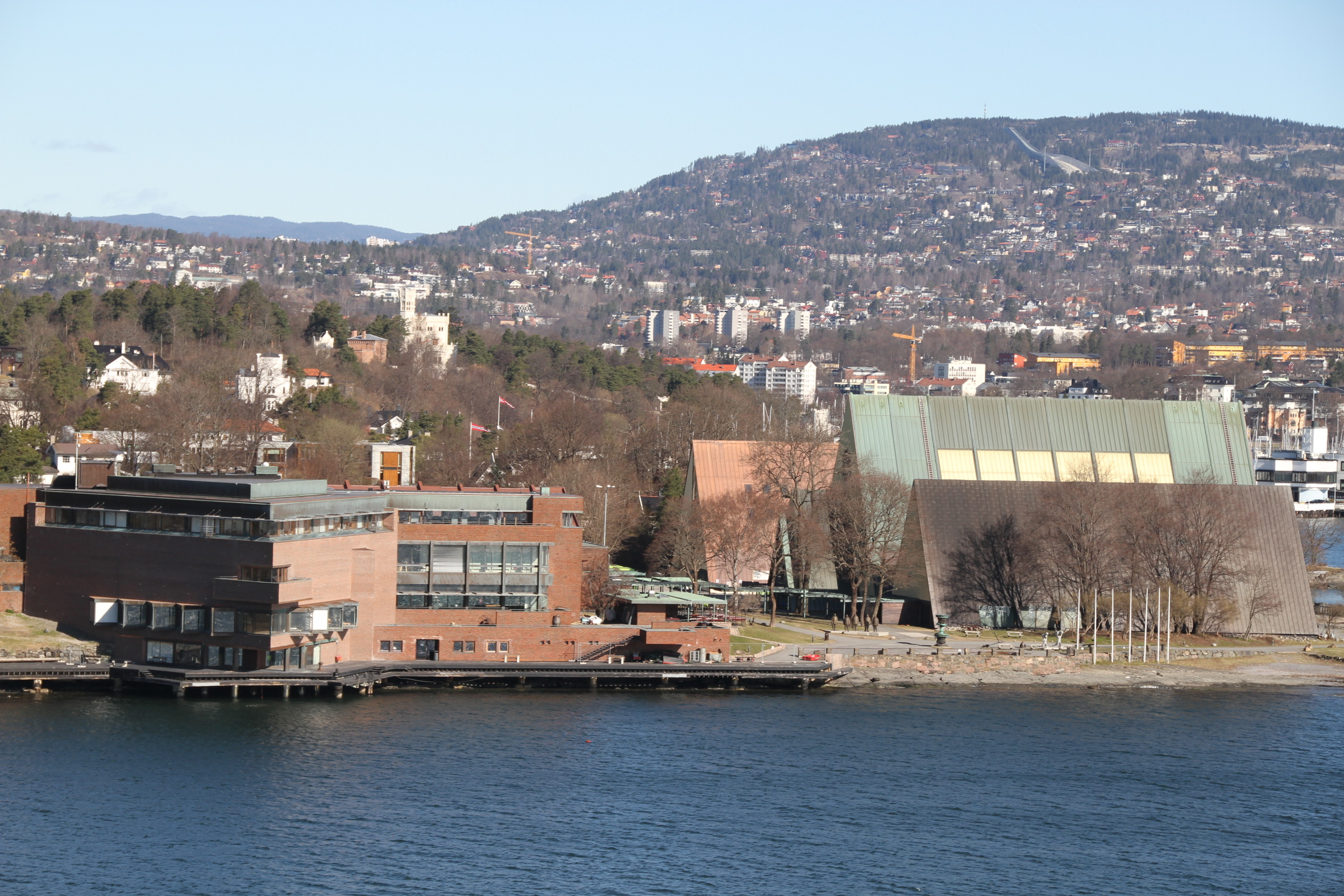 Norsk sjøfartsmuseum på Bygdøynes (Oslo)